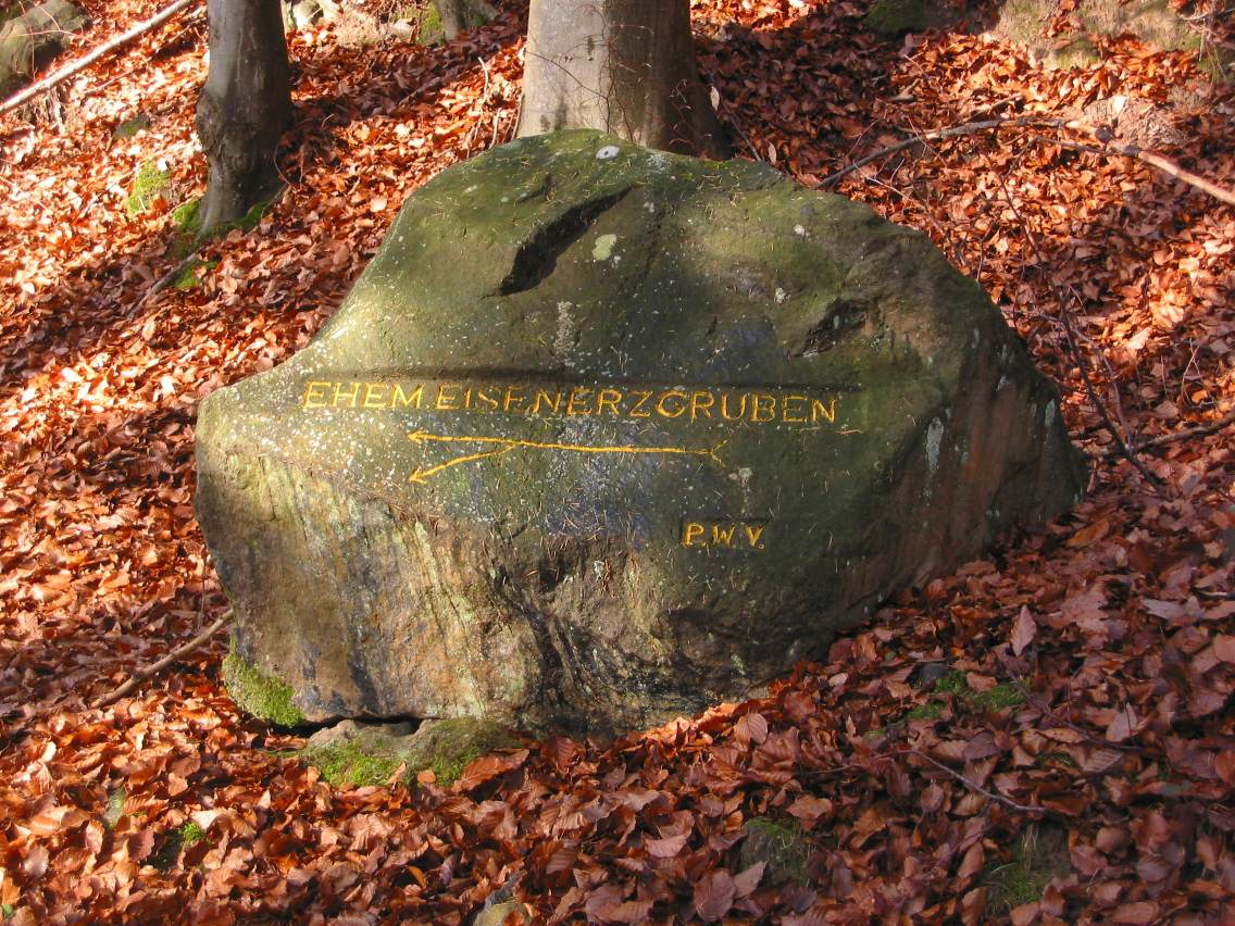 Ritterstein Nummer 30, Ehem. Eisenerzgruben